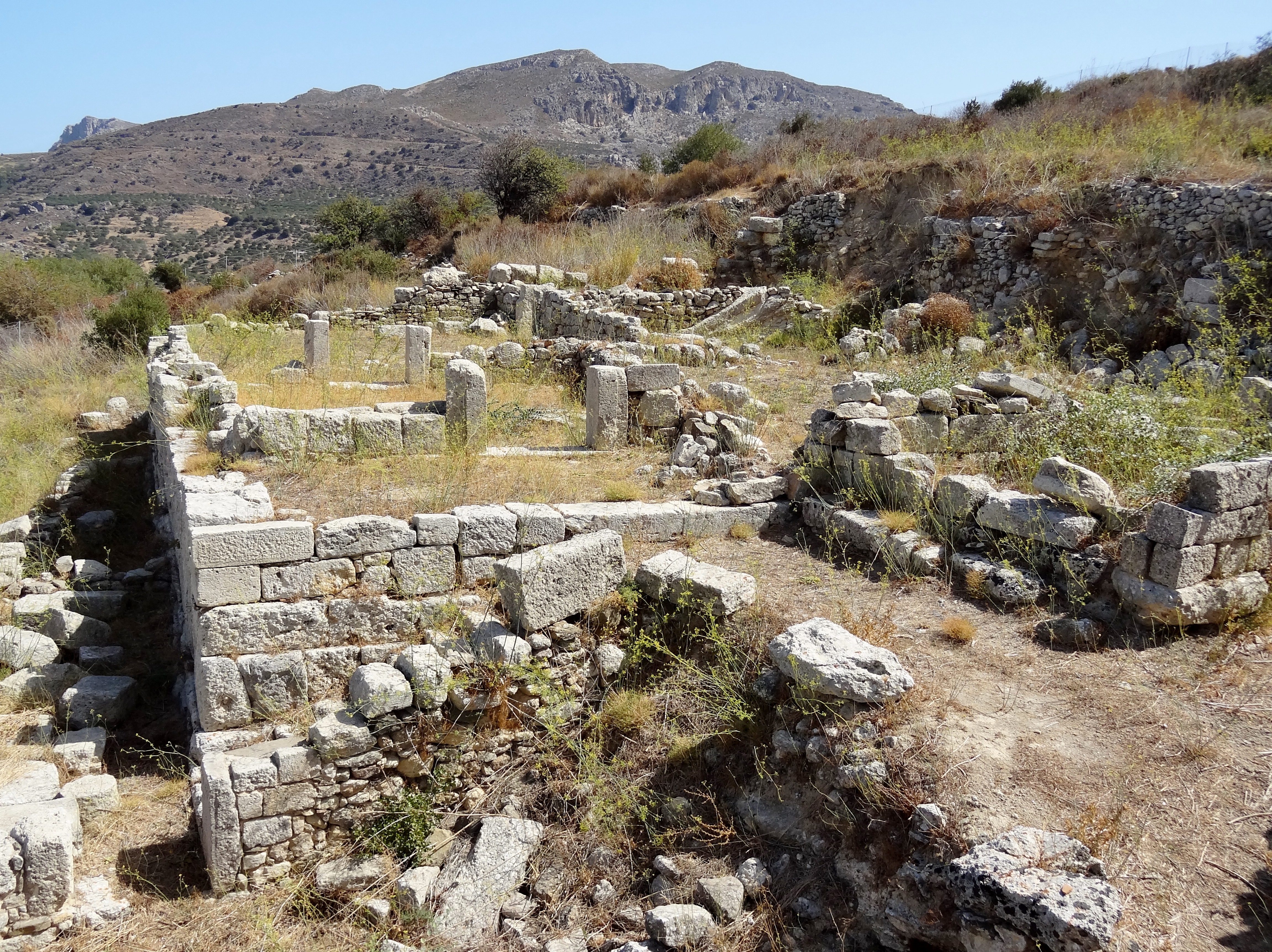 Mandelbaumhaus oder Andreion aus hellenistischer Zeit unterhalb der ersten Akropolis der Ausgrabungsstätte von Praisos (Πραισός), Gemeinde Sitia, Kreta, Griechenland